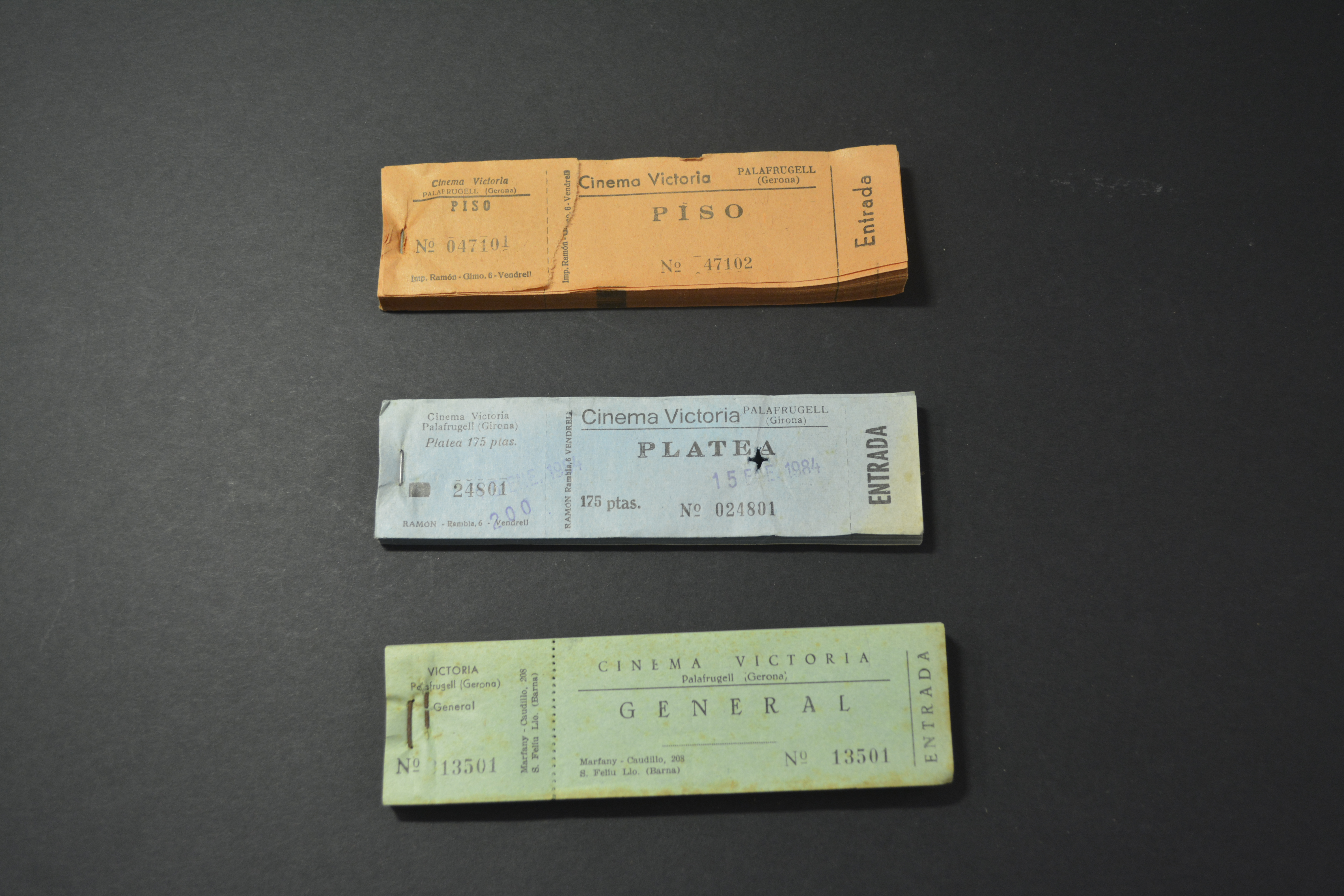 Imatge d'entrades del cinema Victòria (fons CÍrculo Mercantil - Arxiu Municipal de Palafrugell)